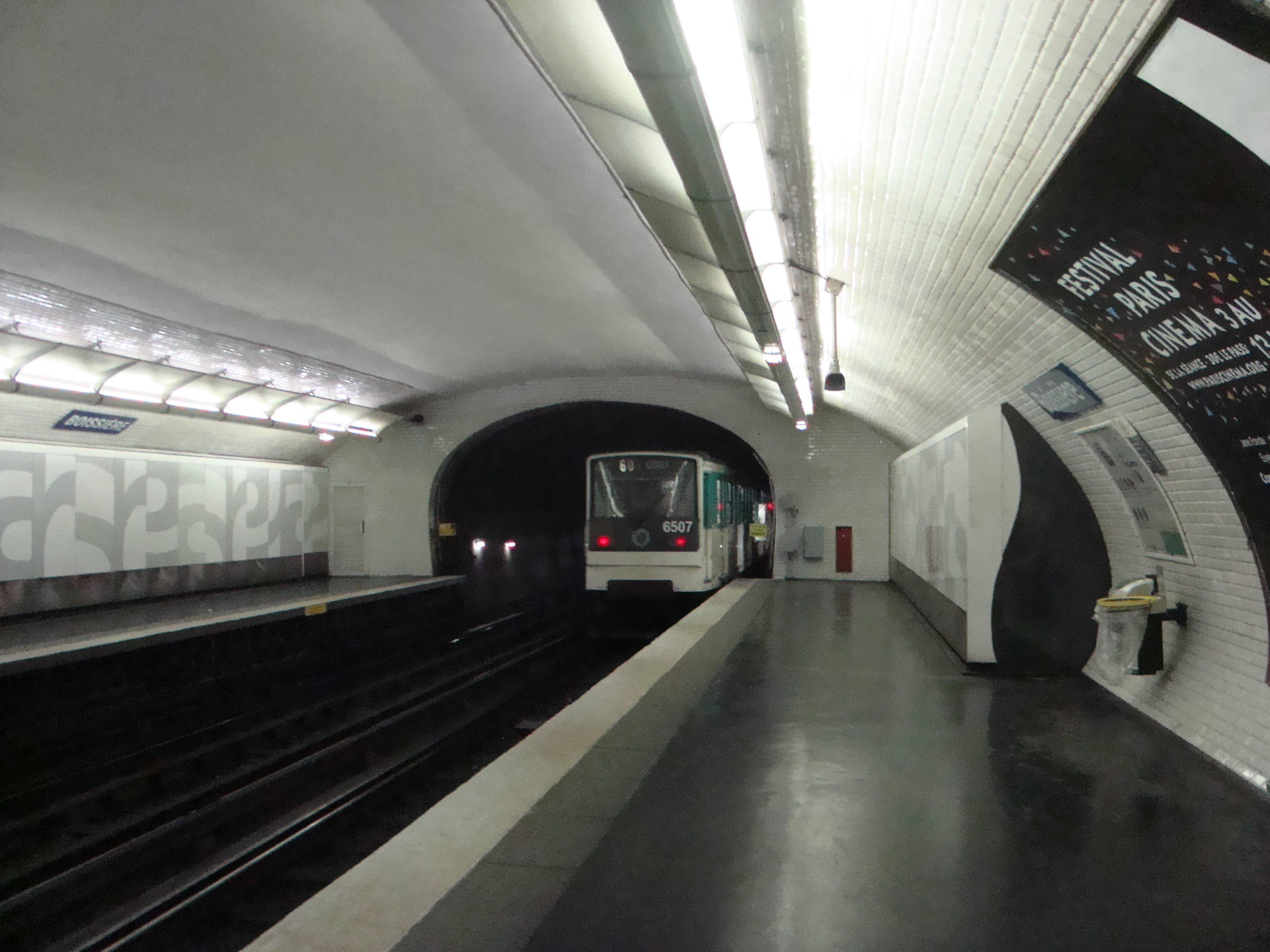 Une rame de la station de métro Boissière sur la ligne 6 en direction de CDG-Etoile